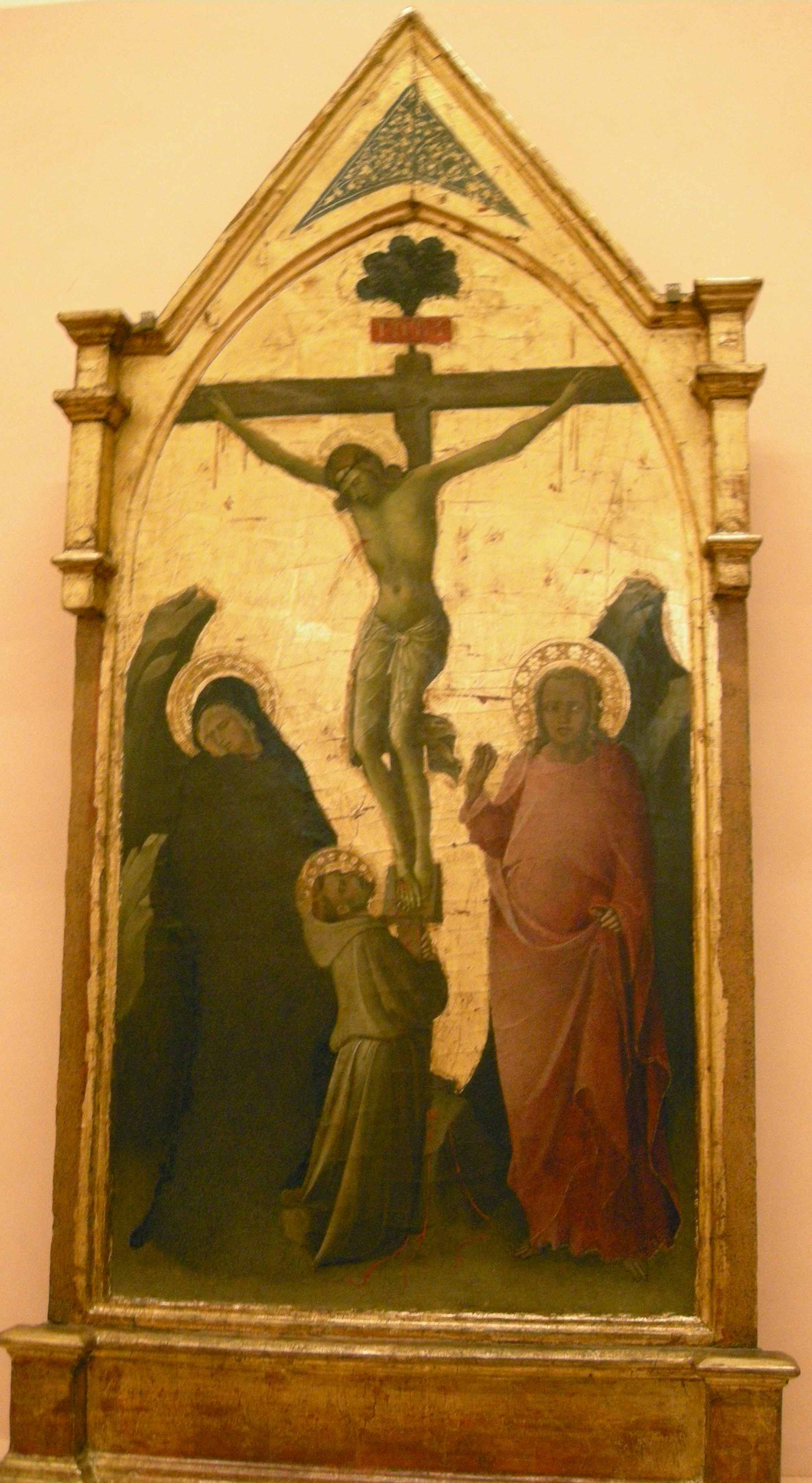 Lorenzo monaco, crocefissione con la madonna, sa giovanni evangelista e san francesco 1420-25